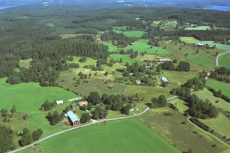 Motiv: Oppeby Nyckelord: Flygbilder, Riksintressen Kategori: Miljöer, OdlingslandskapOppeby